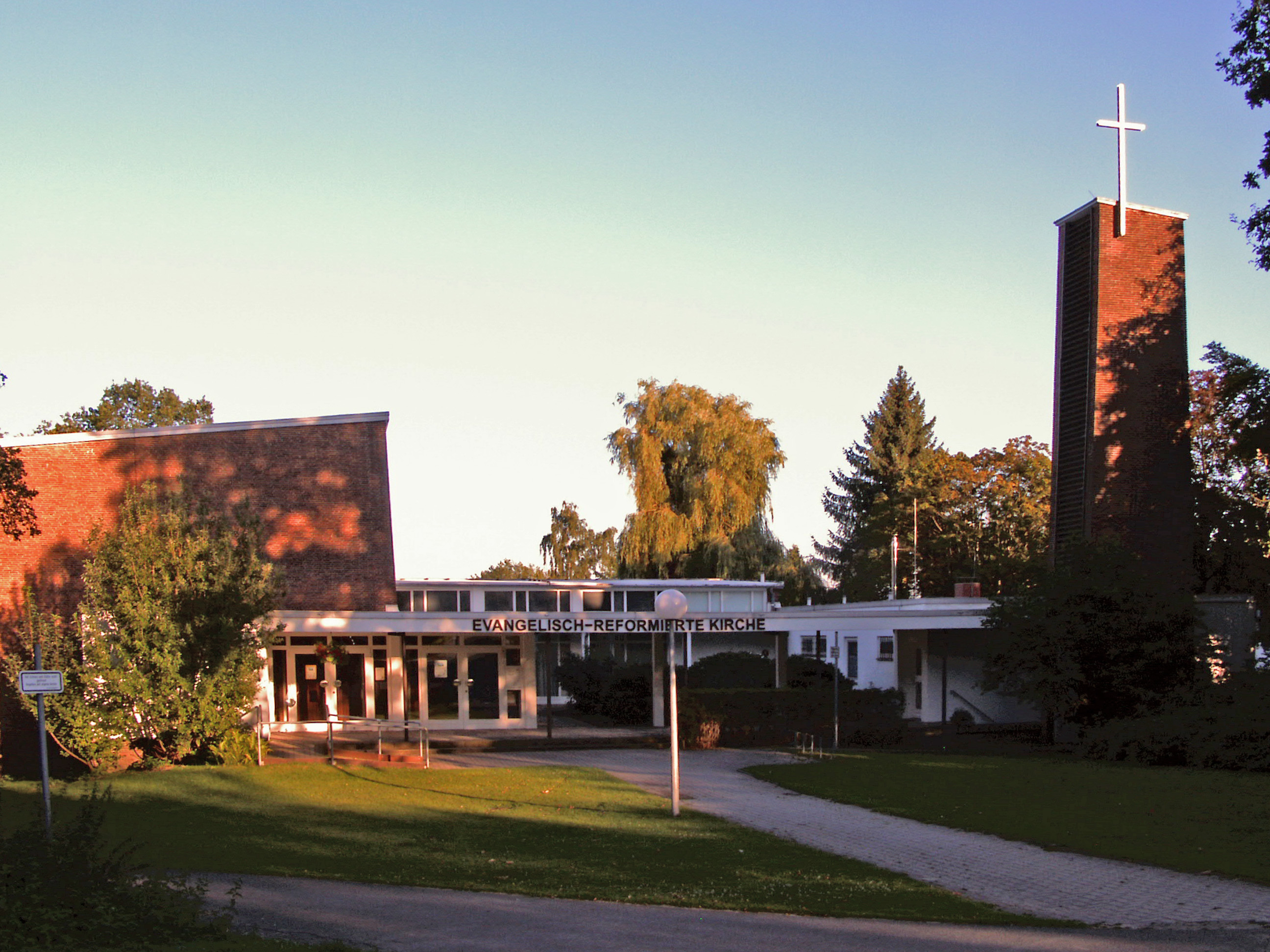 Evangelisch-reformierte Kirche in Wolfsburg, Stadtteil Klieversberg